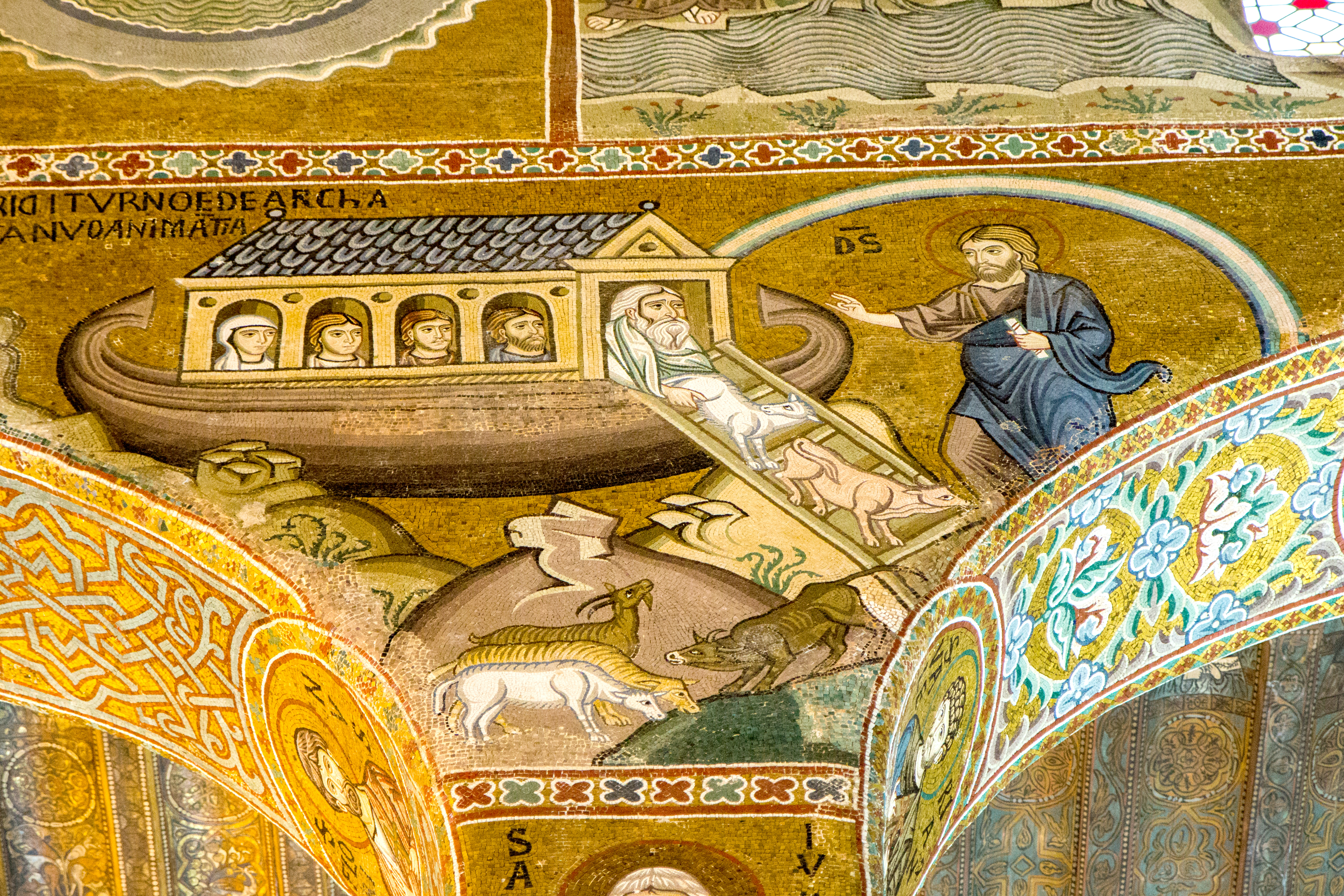 Cappella Palatina